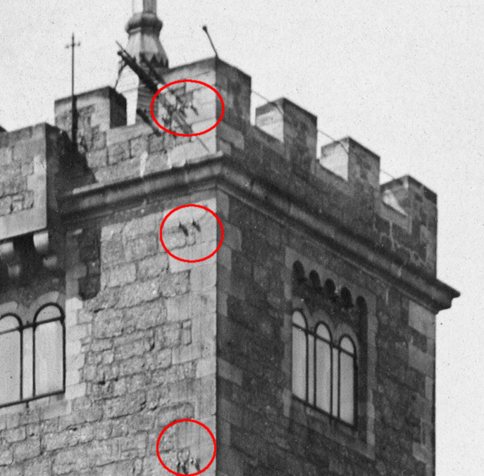 Details der elektrischen Installation an der Ostfassade des Turmes - markiert die Position von Isolatoren.